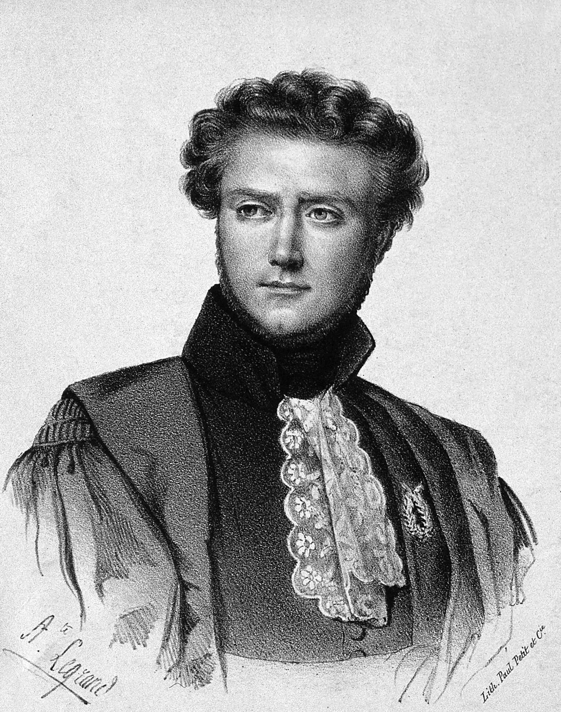 Genre/Technique: Portrait prints. Lithographs. Subject name: Pierquin de Gembloux, 1798-1863.